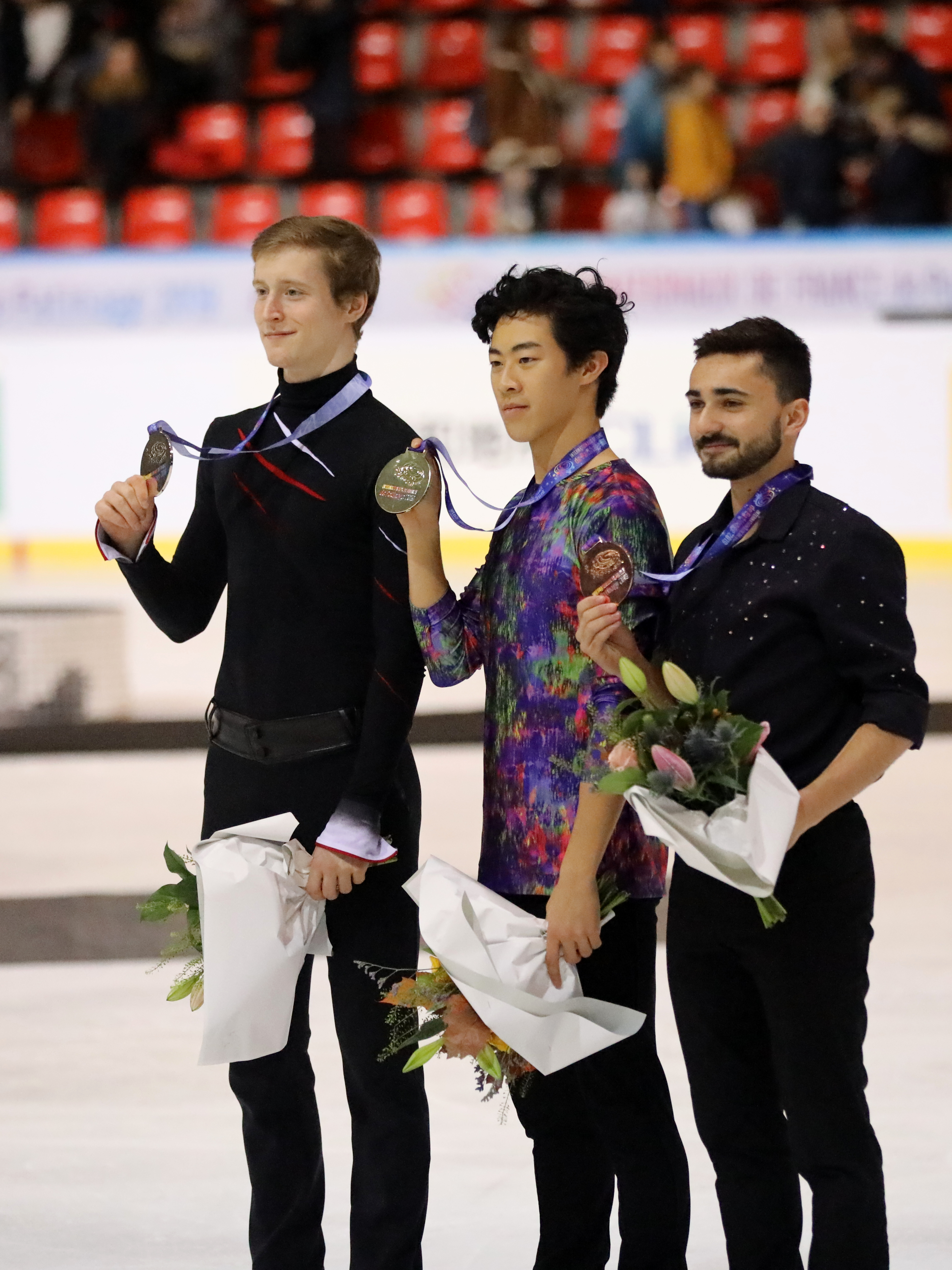 Internationaux de France 2019